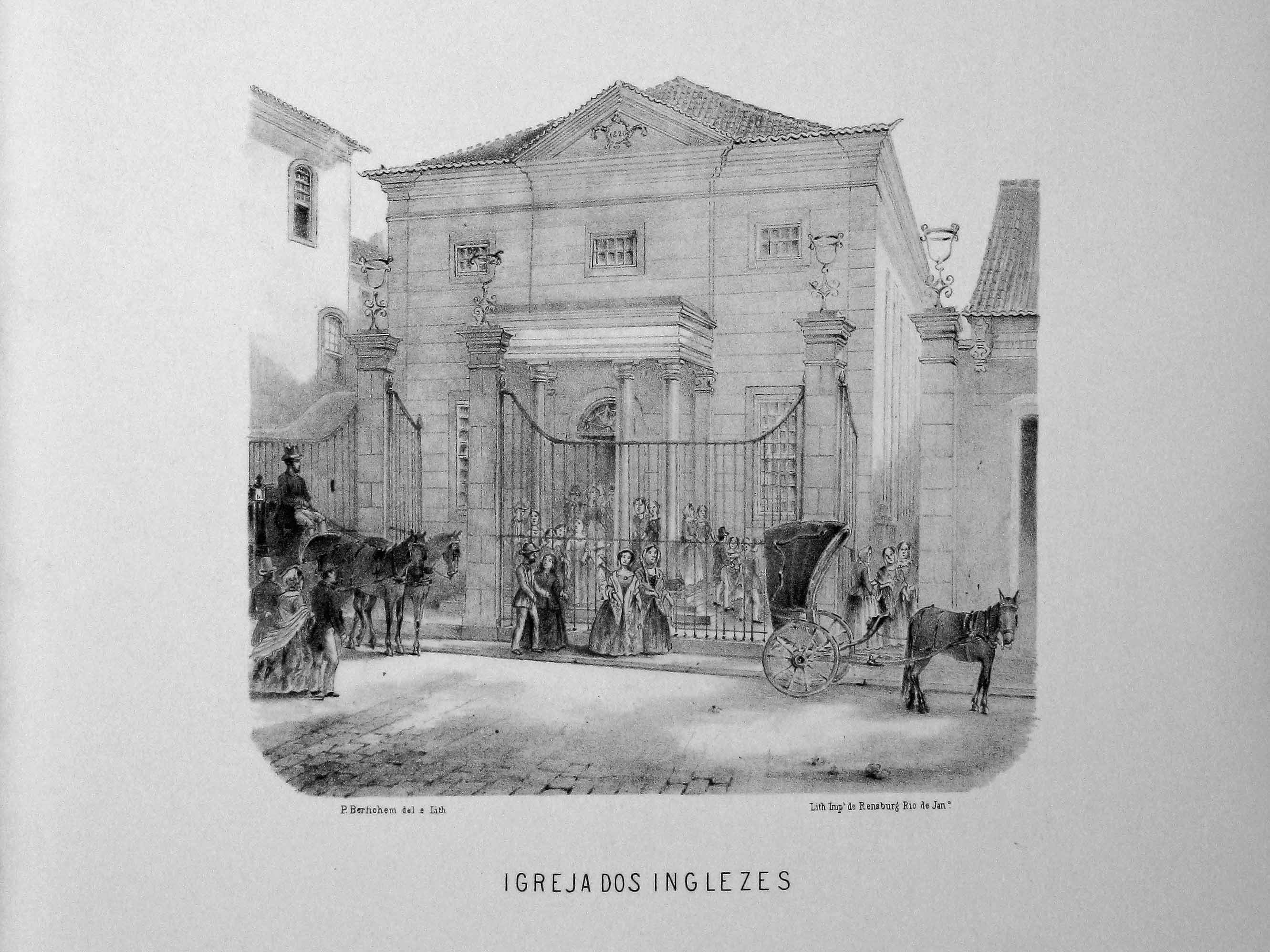 Bertichem - 1856 - Igreja dos Ingleses